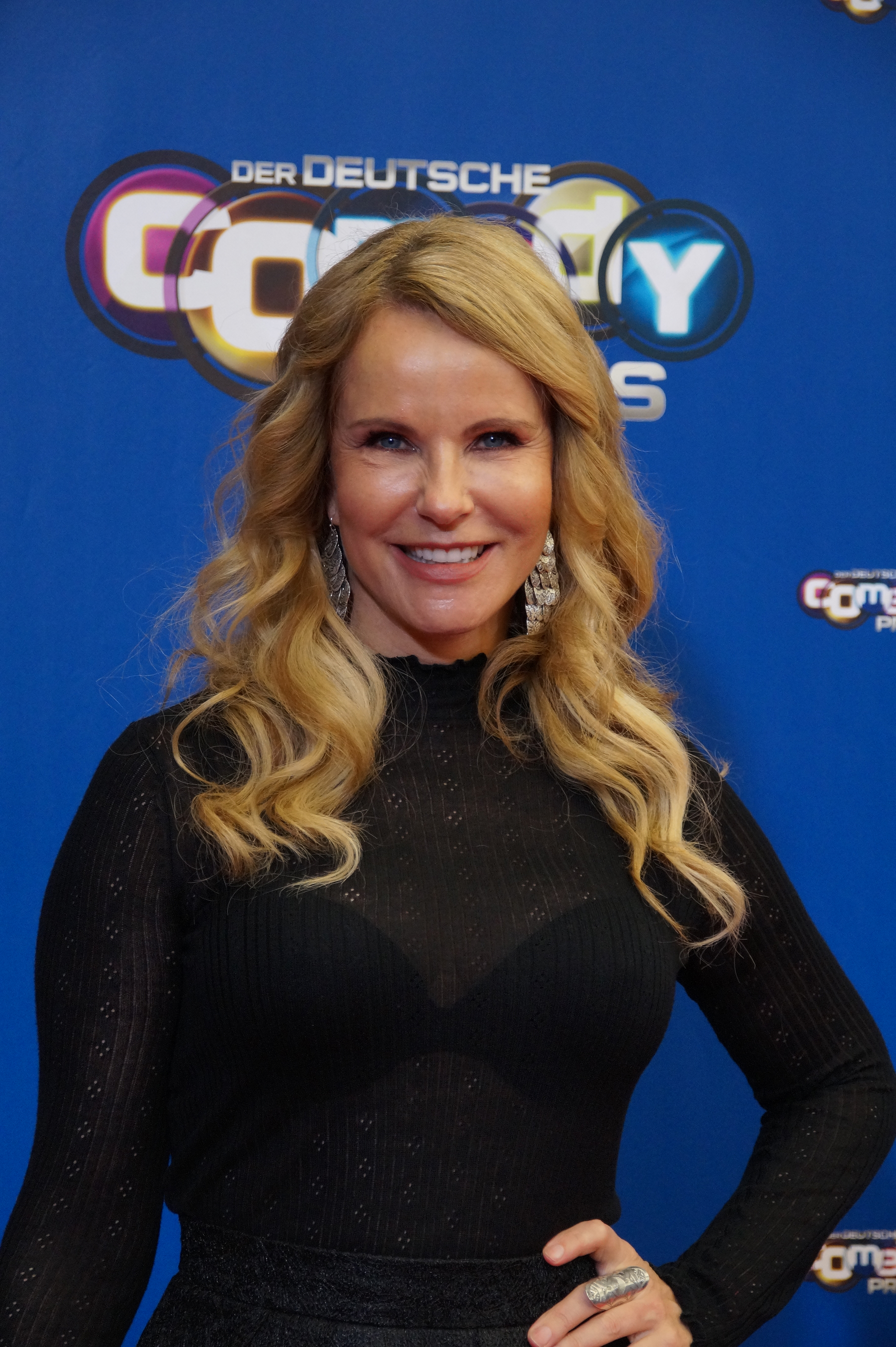 Katja Burkhard beim Comedypreis 2016, im Oktober, Köln.